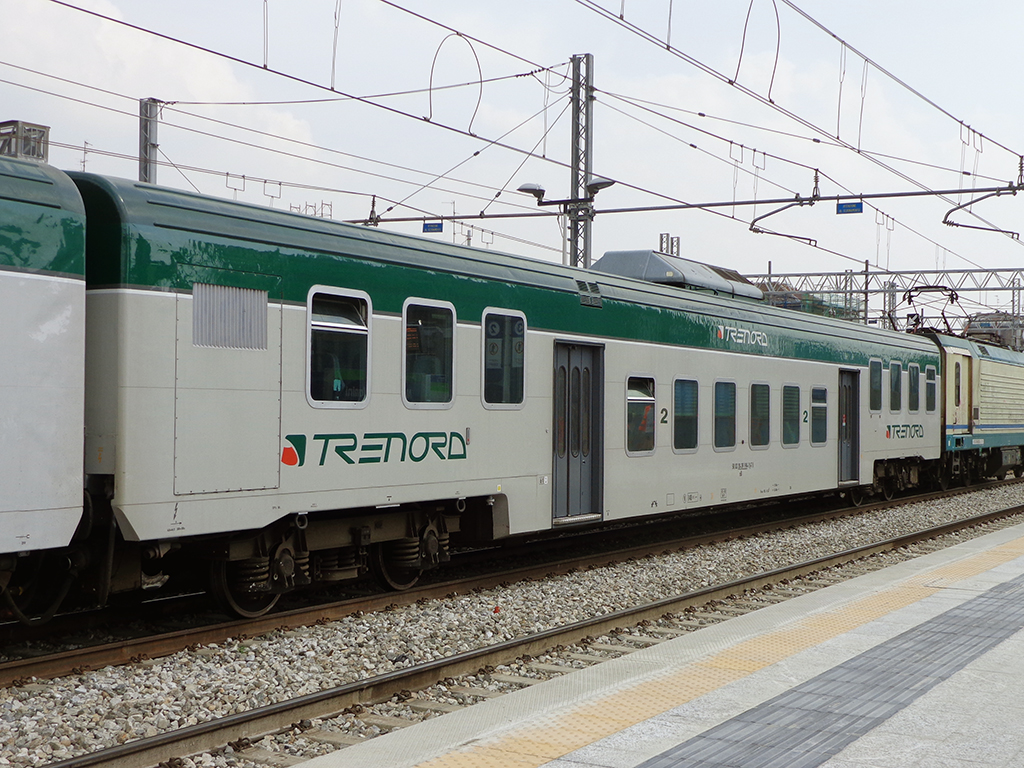 Carrozza a piano ribassato di Trenitalia (in livrea Trenord), marcata 50 83 20-39 184-1, tipo nB, in composizione a un treno suburbano della linea S9 in sosta nella stazione di Milano Forlanini.